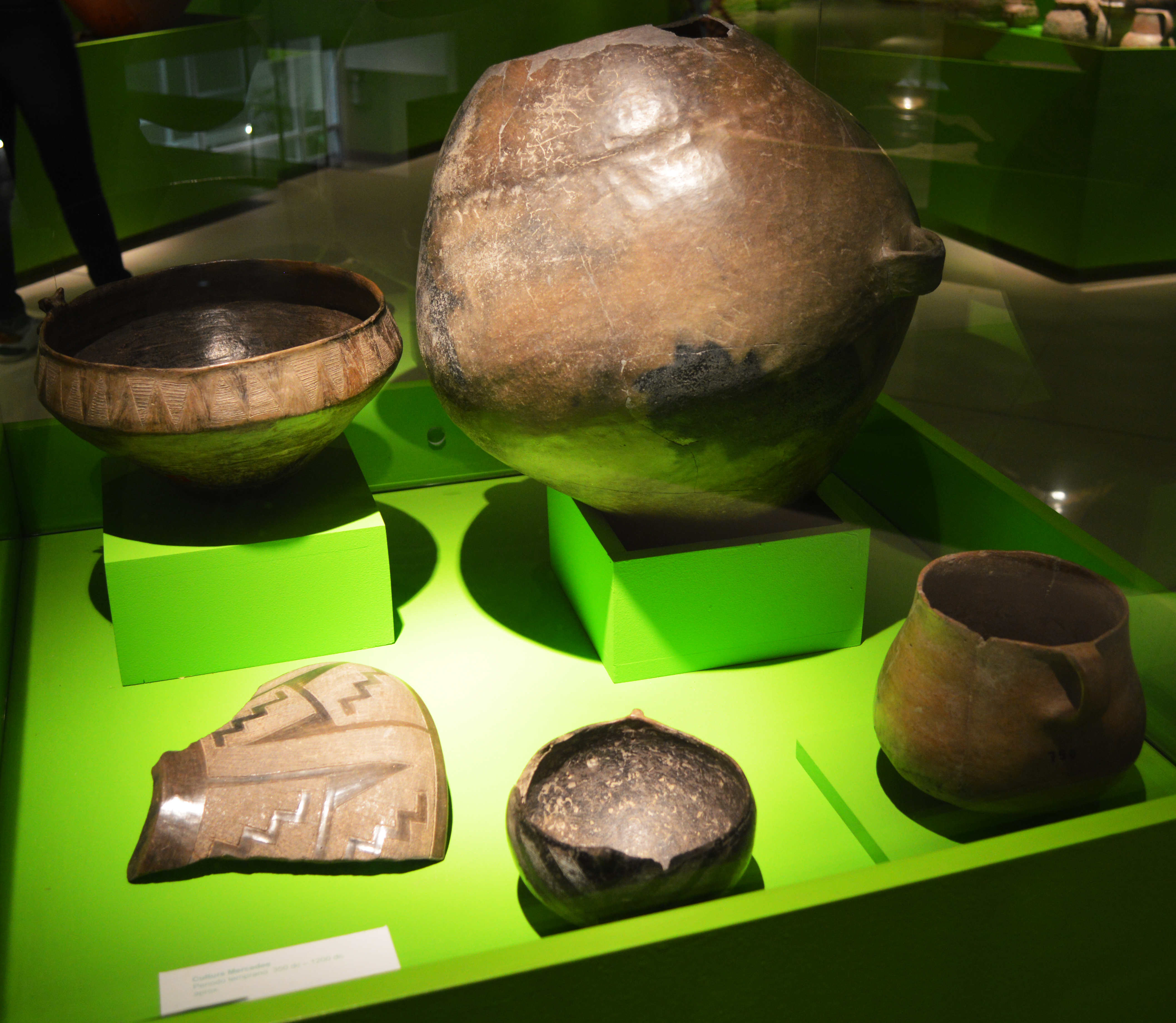 Alfarería indígena.